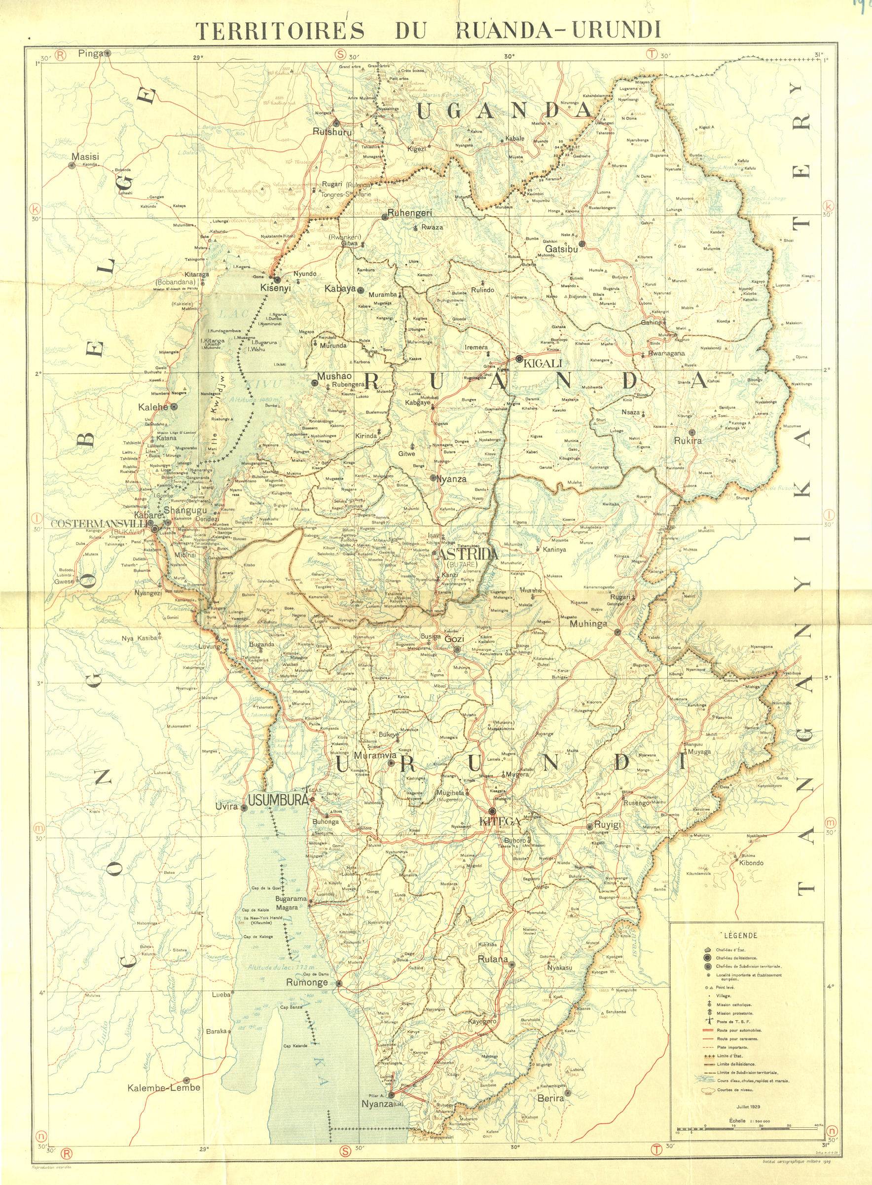 Territoires du Ruanda-Urundi